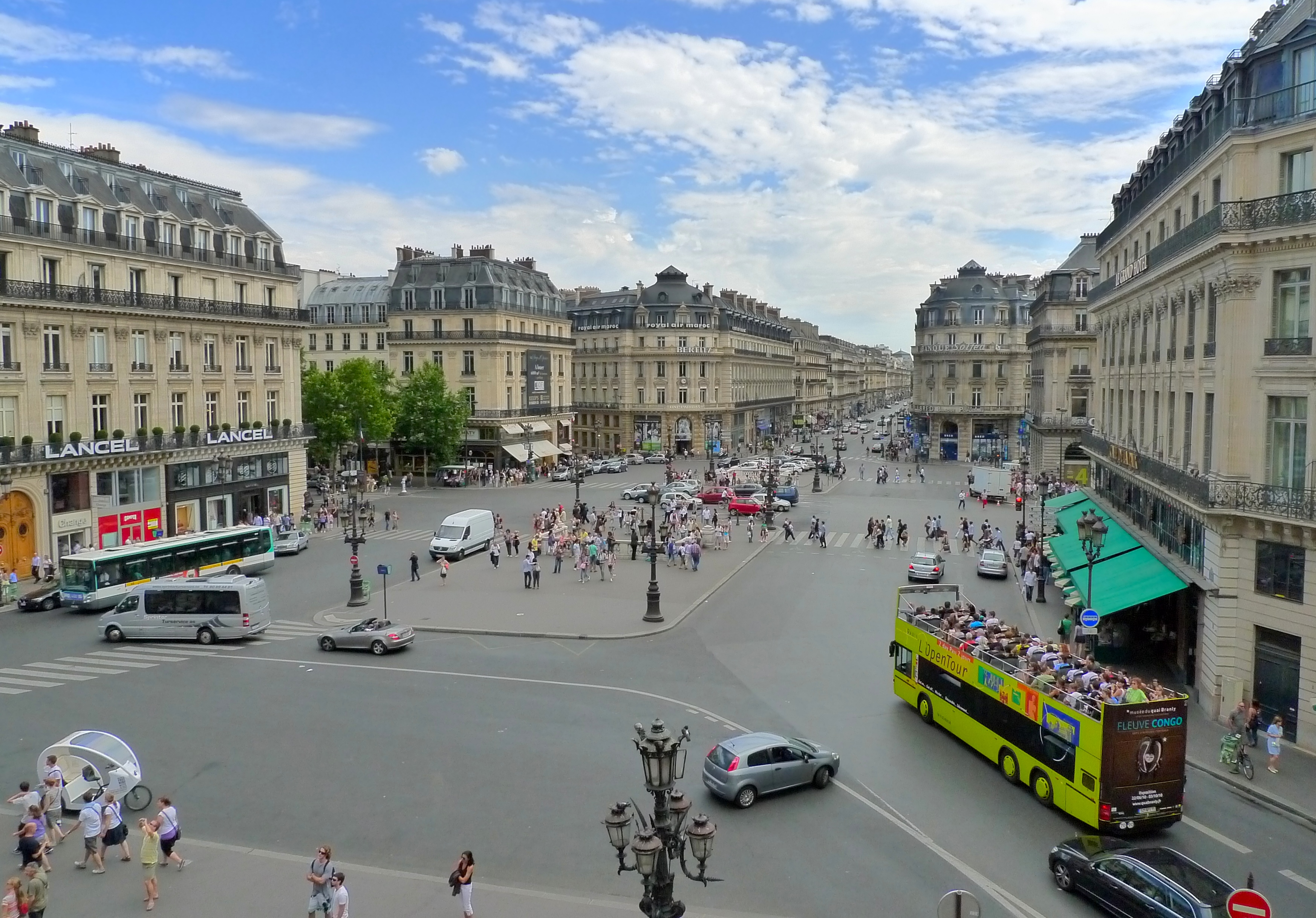 Place de l'Opéra (Paris)